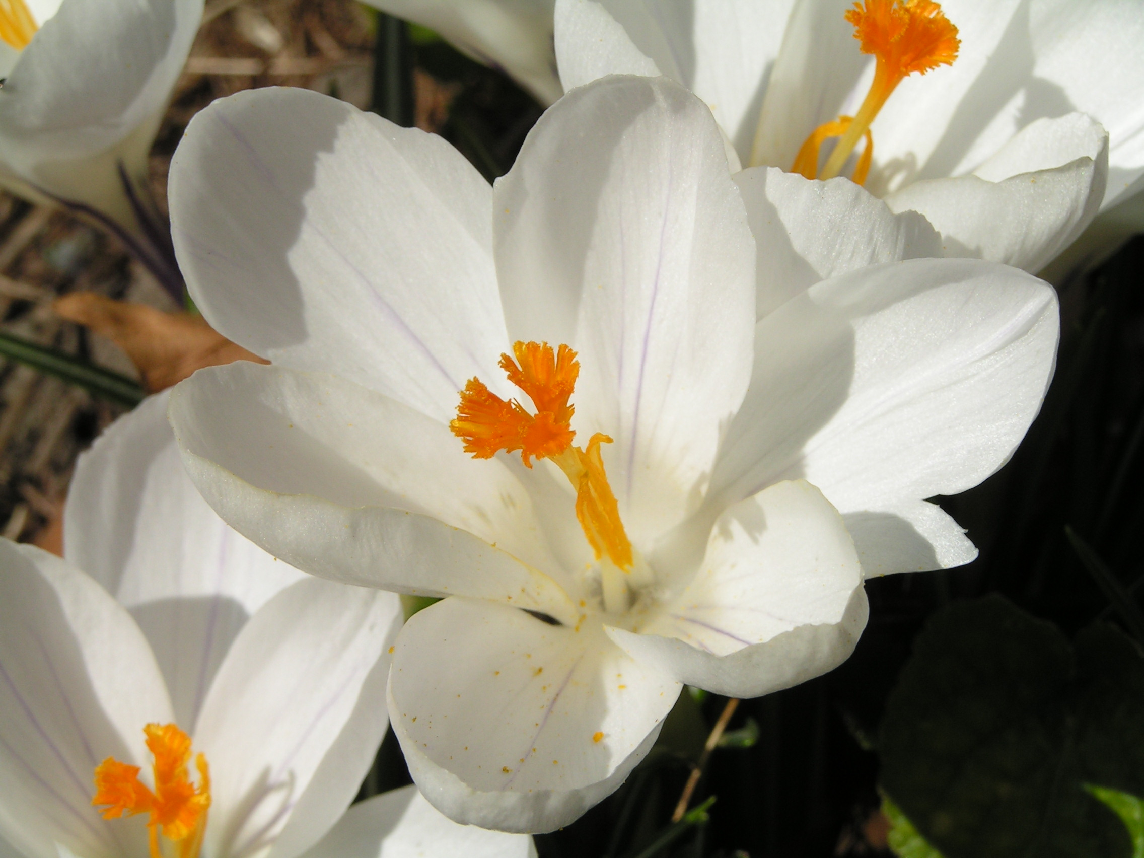 Frühlingsblumen Krokus weiss